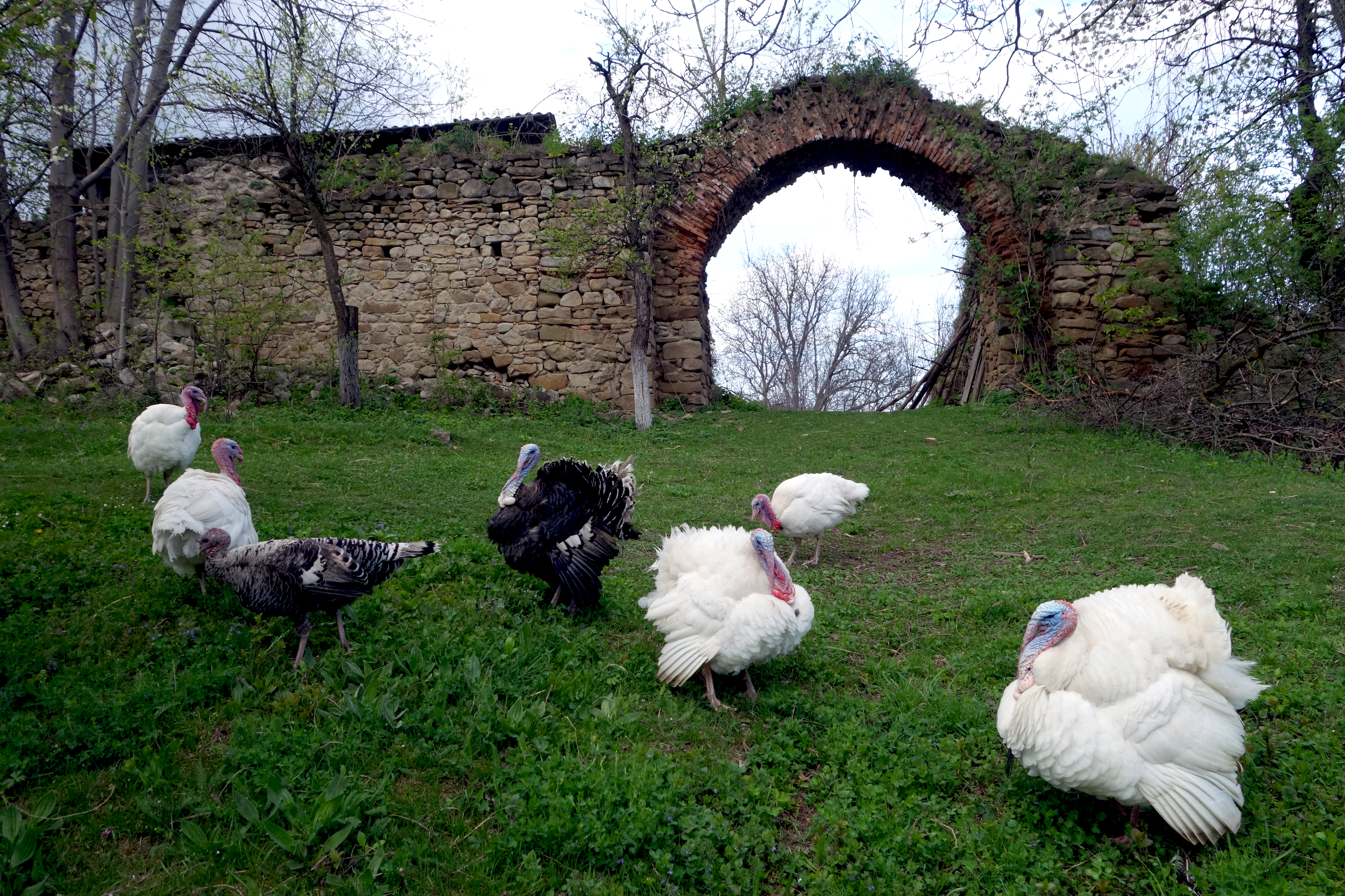 Fosta mănăstire Vizantea